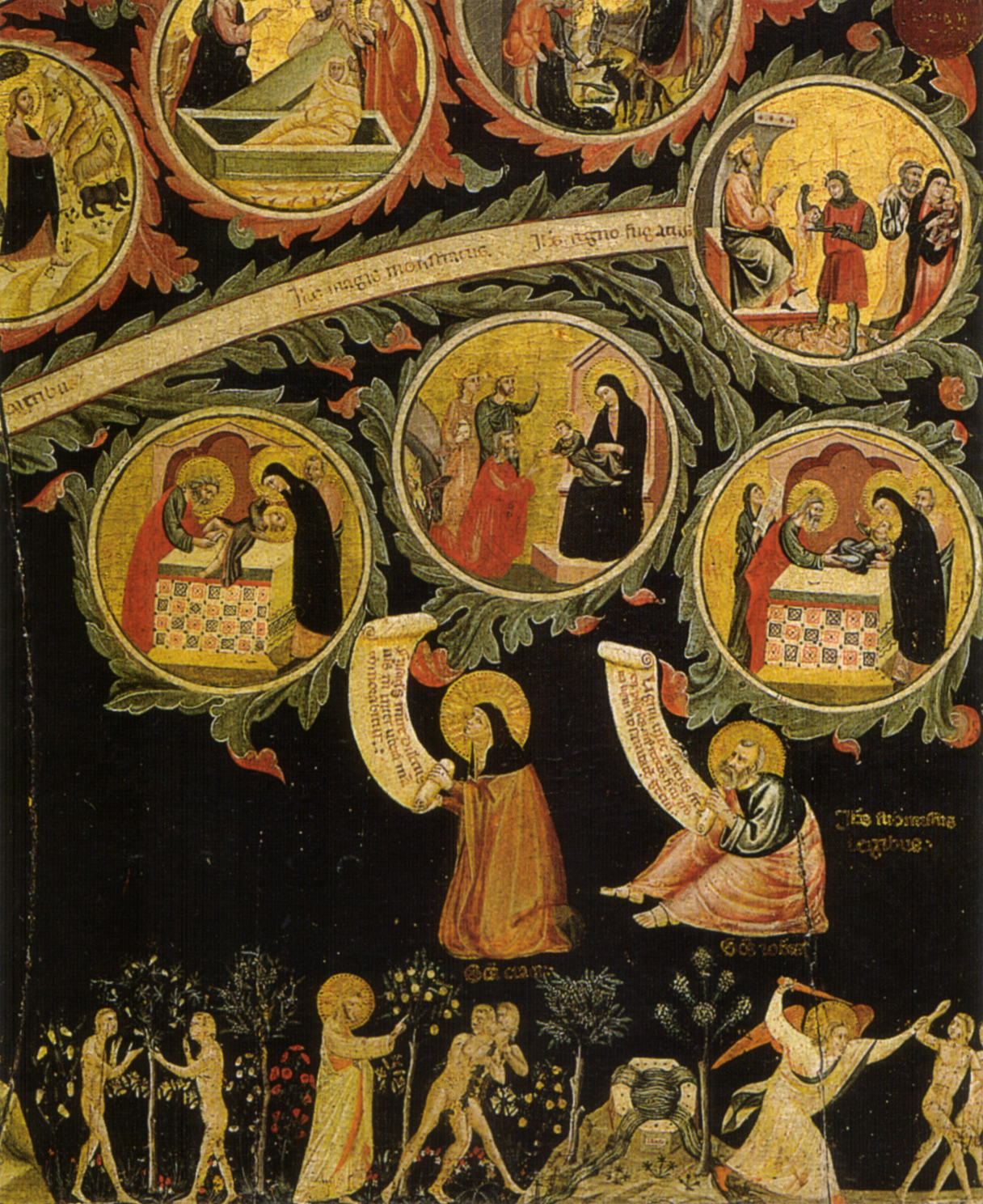 detail